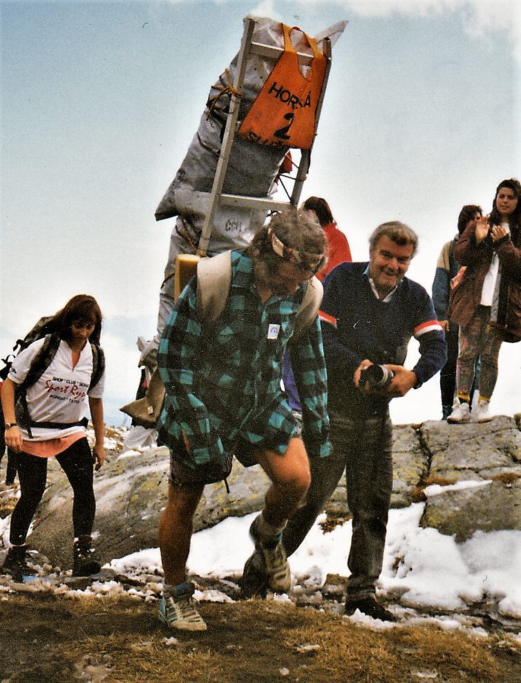 Viktor Beránek , chatár z Chaty pod Rysmi v cieli súťaže horských nosičov Sherpa rallye z Hrebienka na Téryho chatu vo Vysokých Tatrách 17.10. 1999